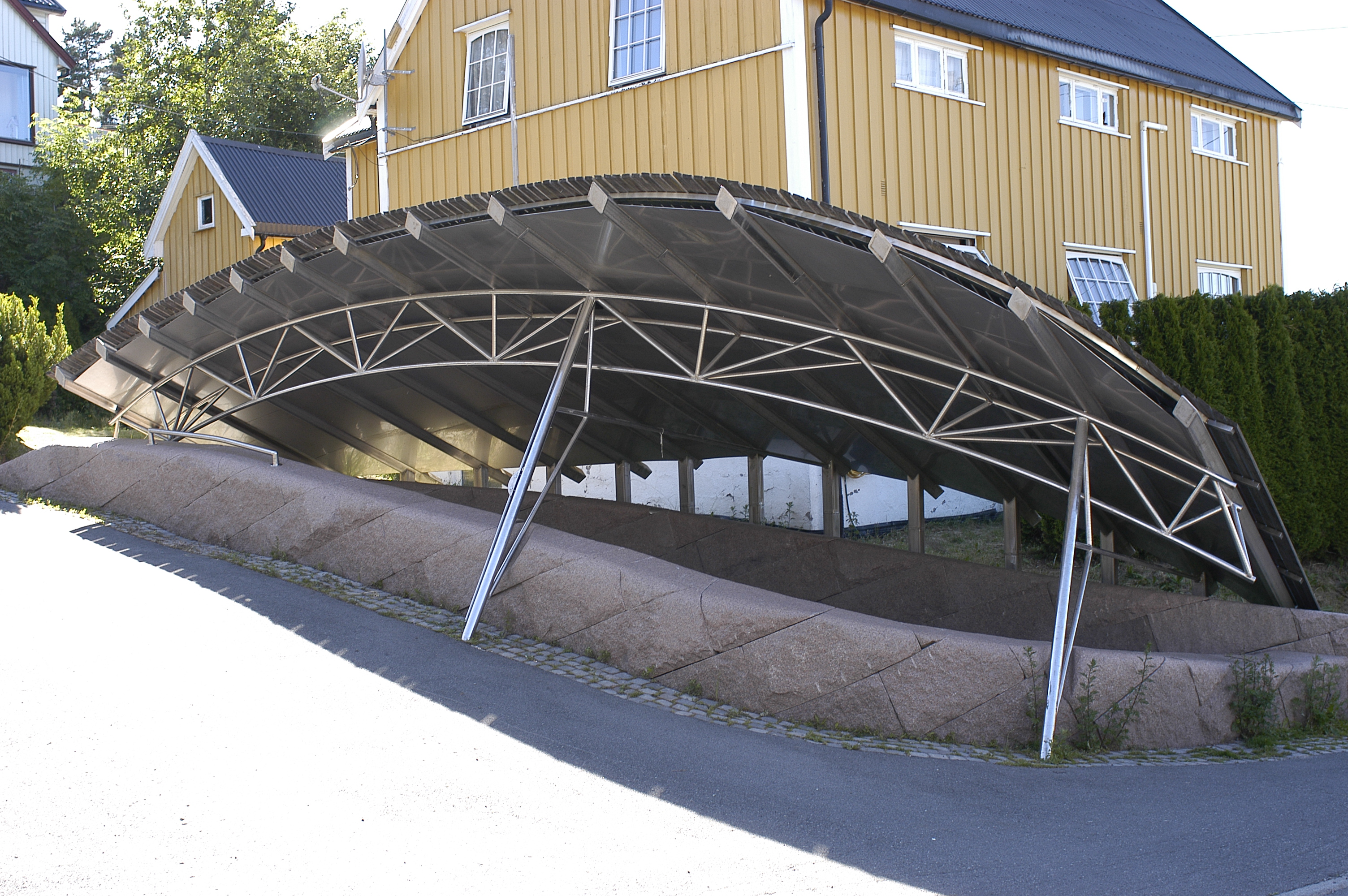 Reisverket over helleristningene, satt opp for å beskytte disse mot vær og vind.